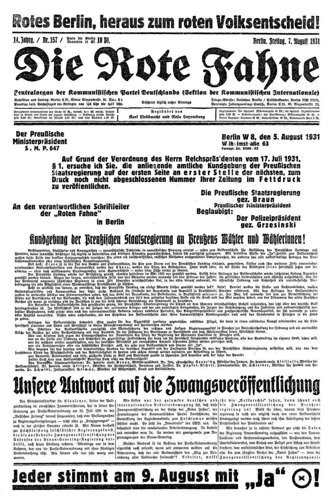 Prima pagina di Die Rote Fahne del 7 agosto 1931. La testata, pur sostenitrice del plebiscito sullo scioglimento del Landtag prussiano del 9 agosto, fu costretta a pubblicare un comunicato del governo socialdemocratico prussiano che invitava all'astensione, in forza del "secondo decreto presidenziale per contrastare gli eccessi politici" del 17 luglio 1931. L'ordine di pubblicazione è firmato dal ministro presidente della Prussia Otto Braun e dal capo della polizia Albert Grzesinski.